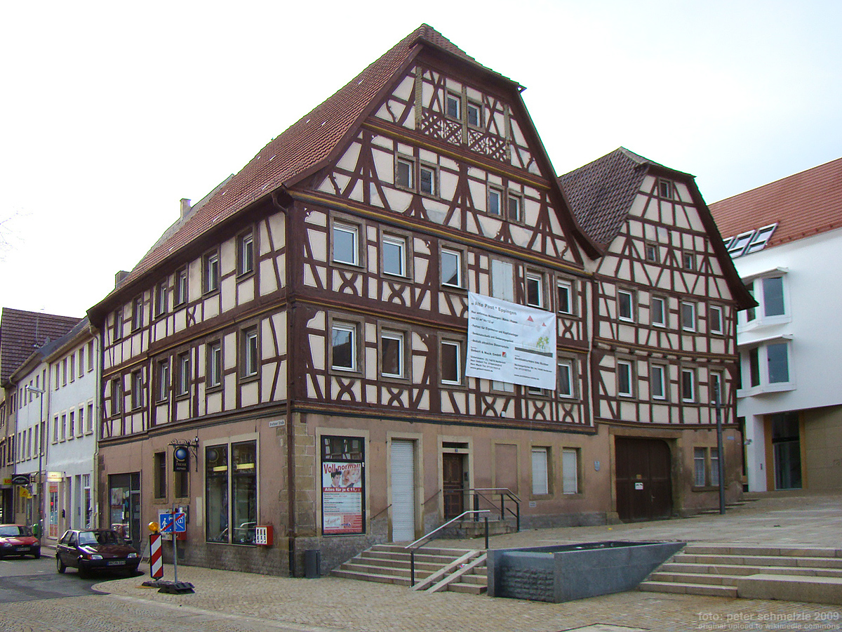 Alte Post am Marktplatz in Eppingen